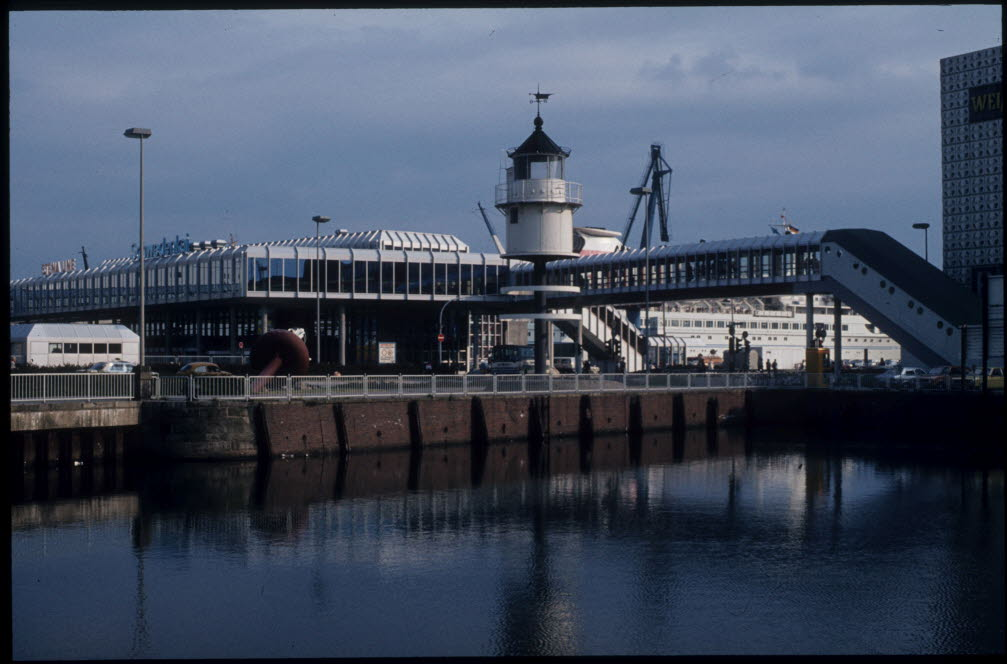 In der Bildmitte der alte Friedrichsorter Leuchtturm am Bootshafen.